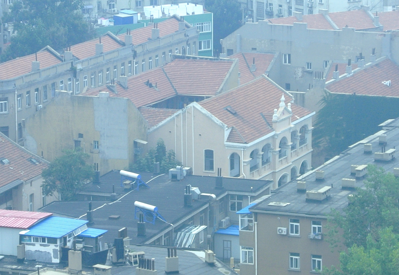 青岛广东会馆旧址俯瞰